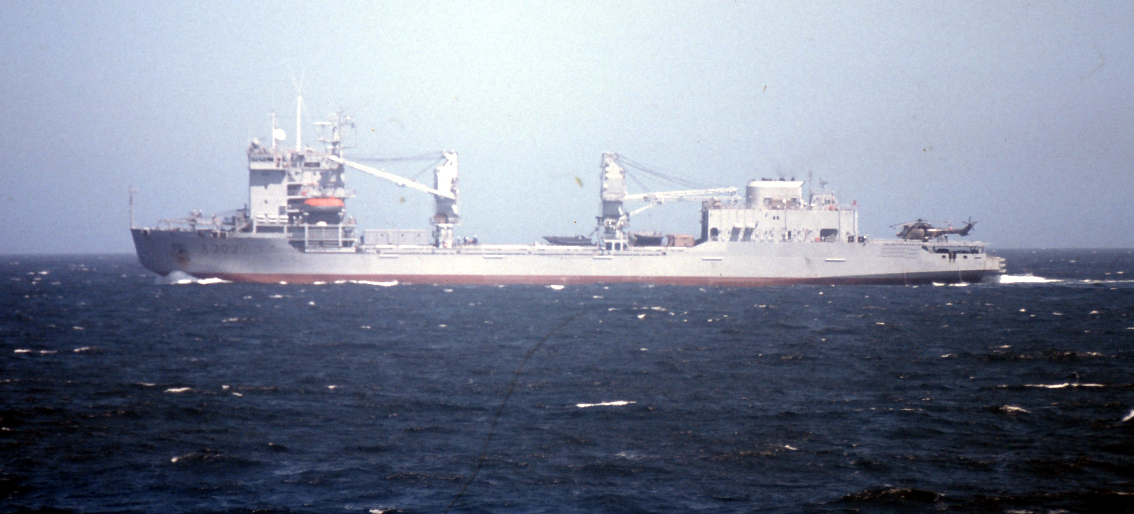 The SAS Outeniqua